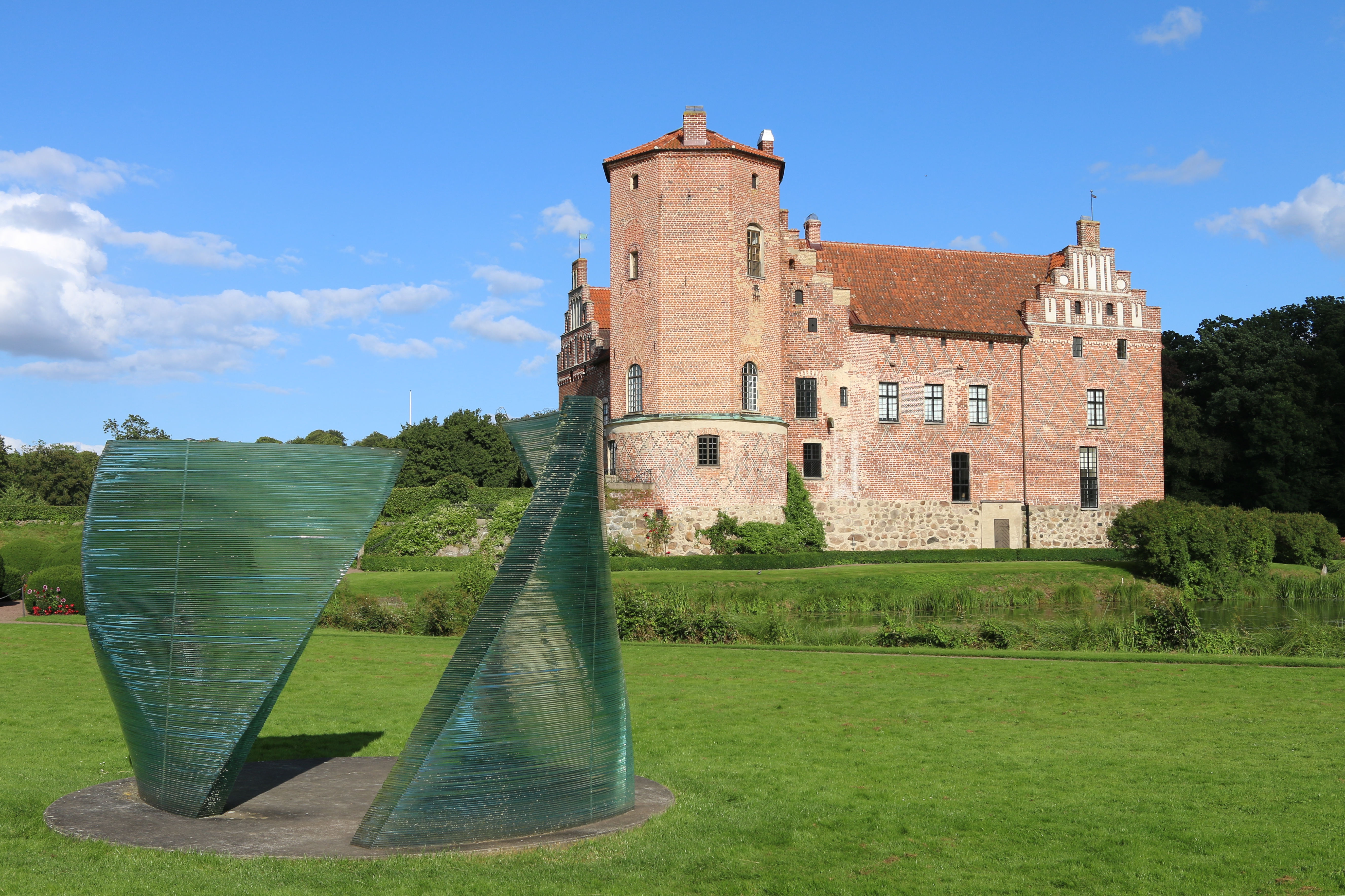 Torups slott 2017